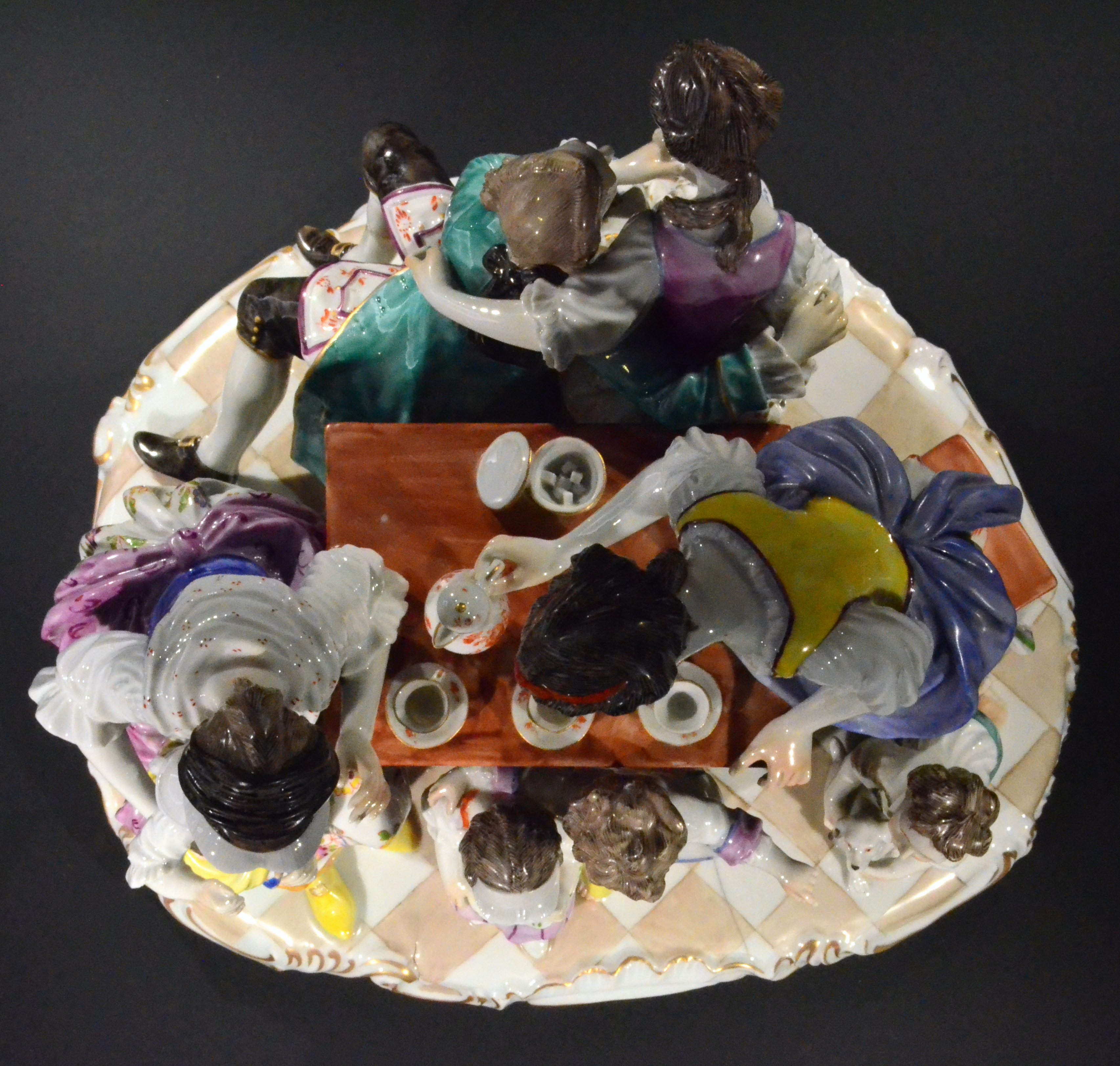 Jean Jacques Desoches: Kaffeegesellschaft, auch Familie am Kaffeetisch, ca. 1770, Draufsicht.